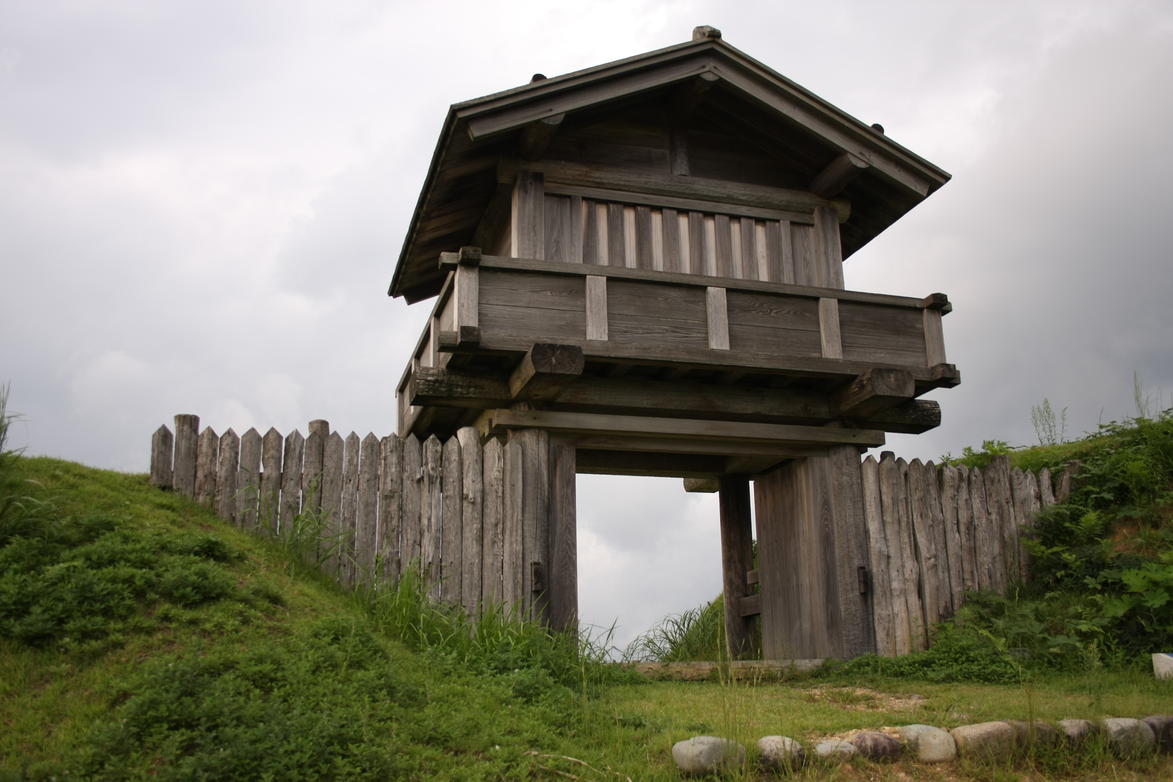 鳥越城本丸門